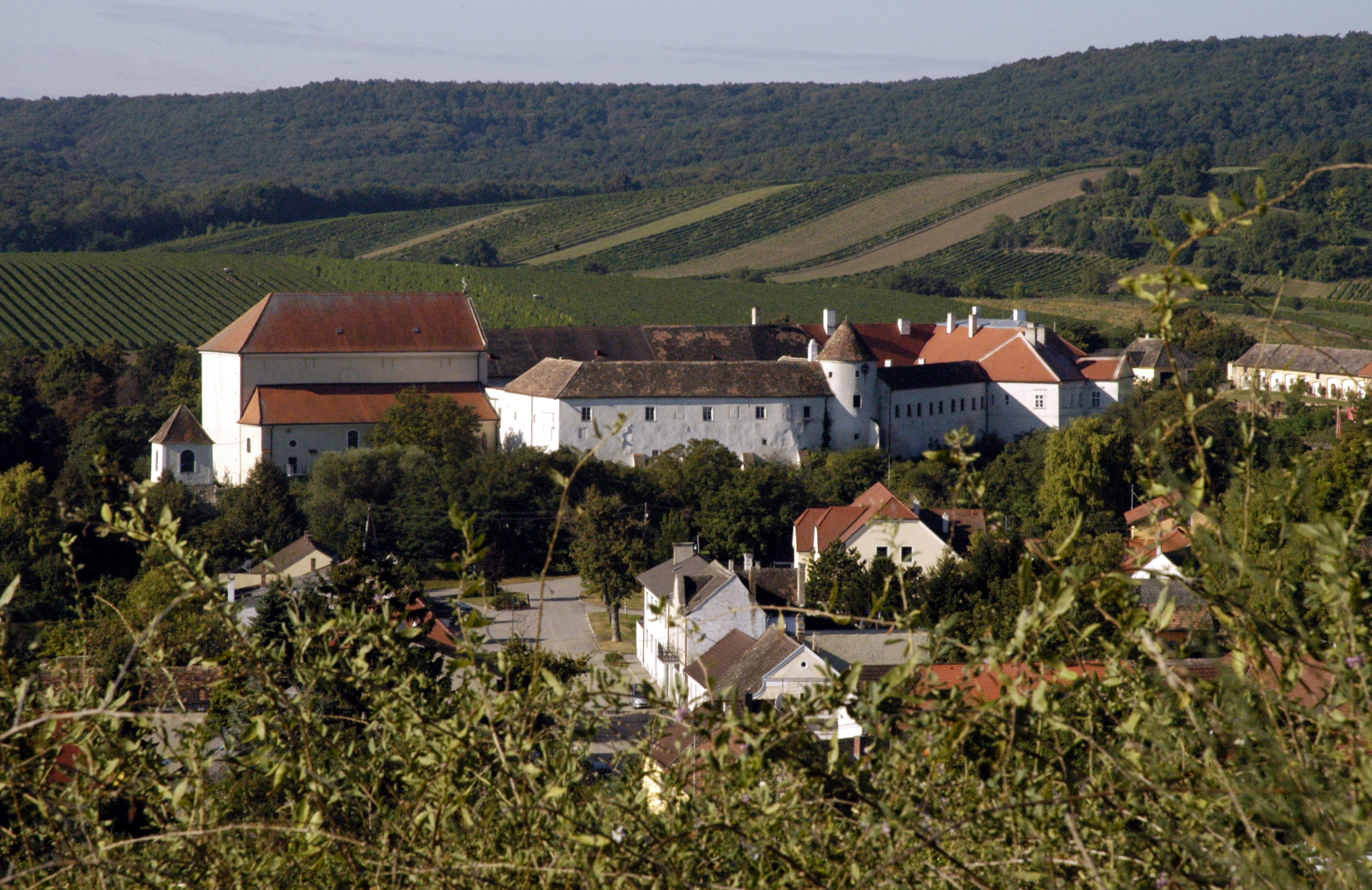 Schloss Mailberg mit Schlosskirche zum Hl. Johannes dem Täufer und Grabenanlage (Gesamtansicht)